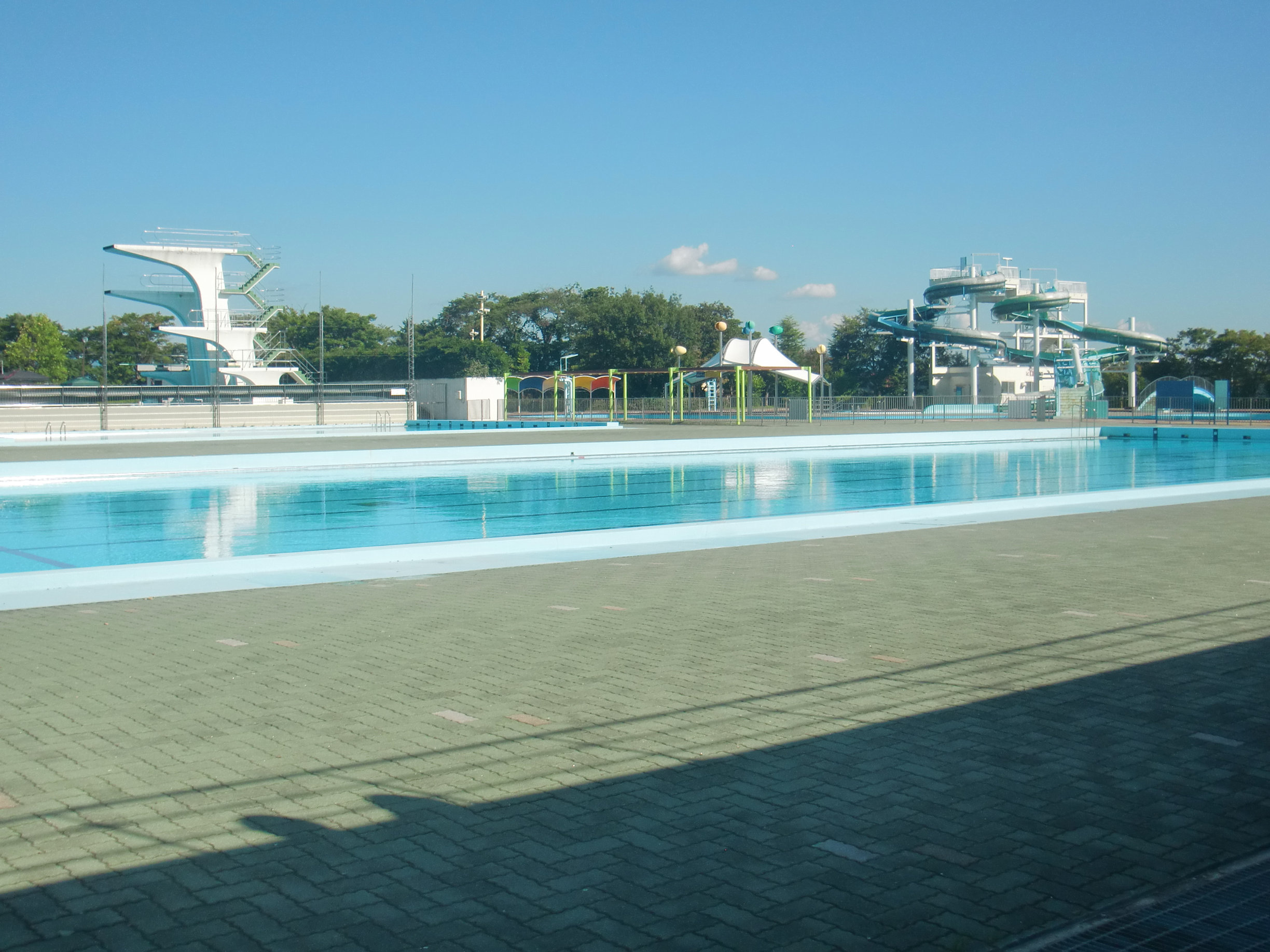 郡山市のカルチャーパーク プール 飛び込み用の台と奥にスライダーが見える